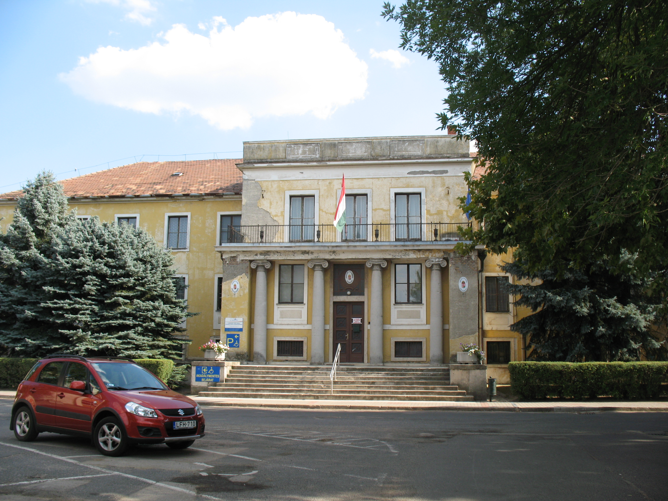 Sárbogárd